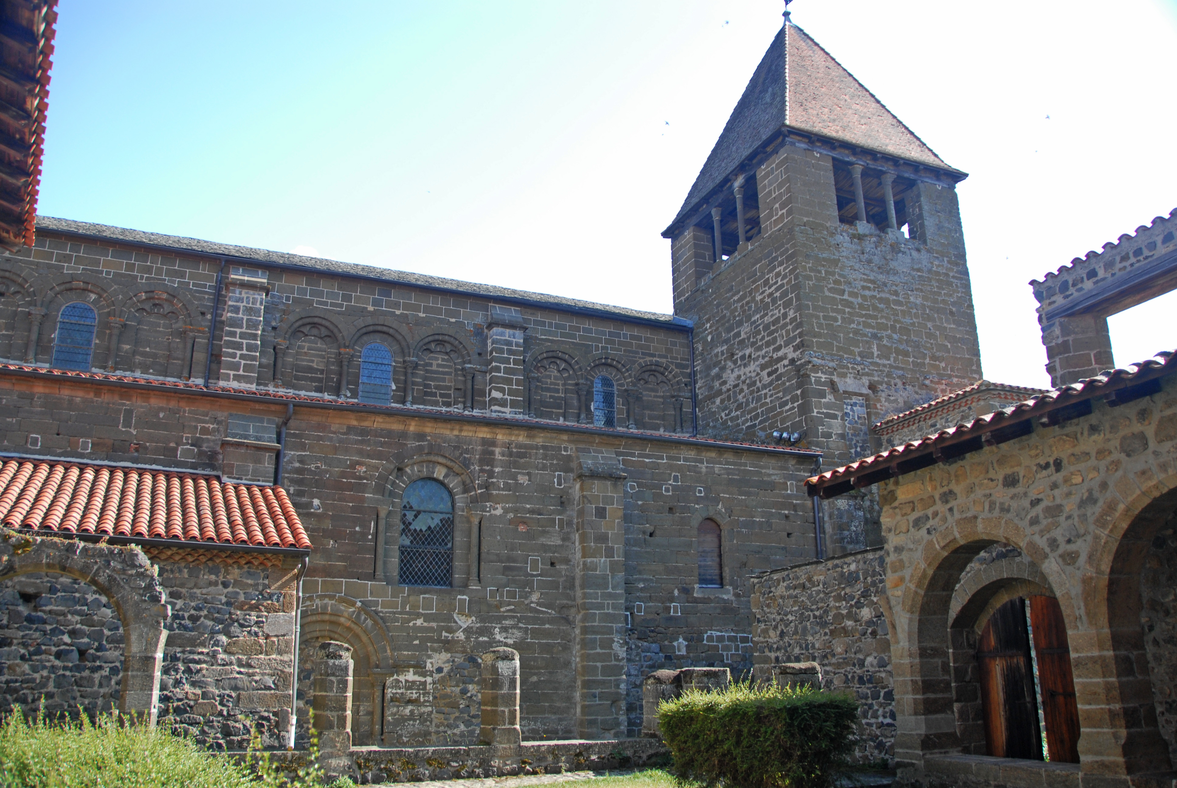 Chanteuges, Kirche, aus dem Kreuzgang